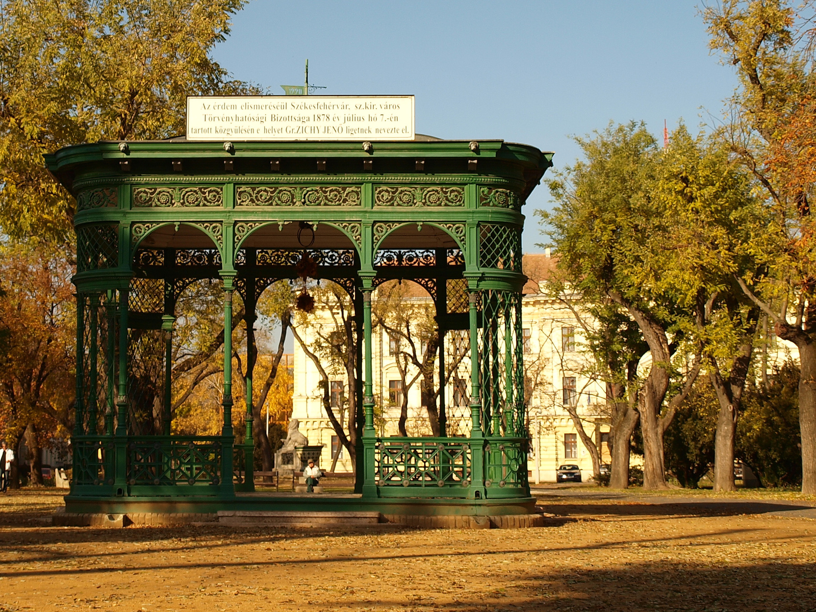 Öntöttvas zenecsarnok - A tető déli oldalán attikaszerű feliratos tábla: Az érdem elismeréséül Székesfehérvár, sz. kir. város. Törvényhatósági Bizottsága 1878 év július hó 7.-én tartott közgyűlésén e helyet Gr.ZICHY JENŐ ligetnek nevezte el.- Székesfehérvár, Zichy liget This is a photo of a monument in Hungary, Identifier: 3927